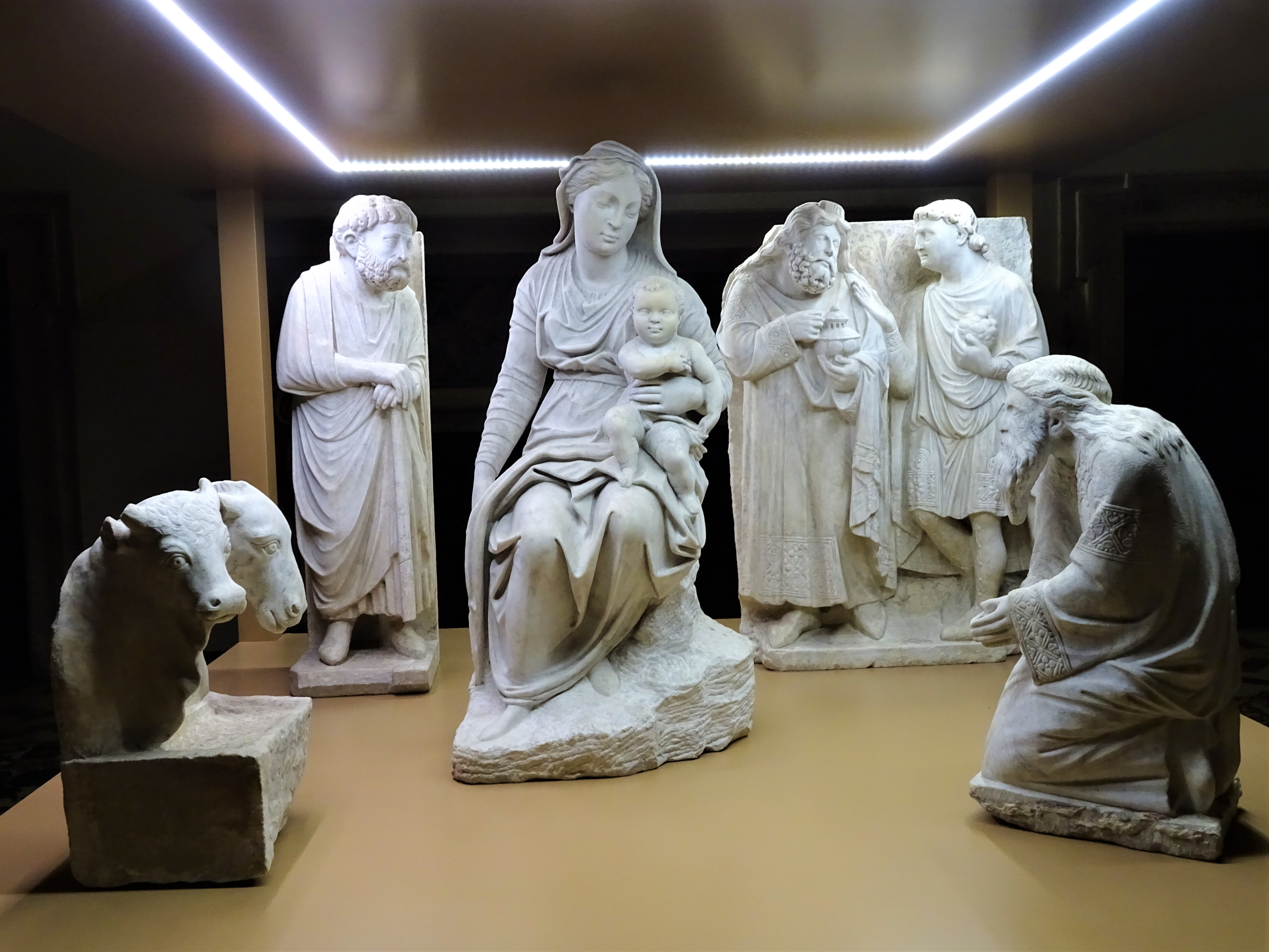 tijdelijk tentoongesteld (2020) in de pauselijke vertrekken van de Santa Maria Maggiore, Rome